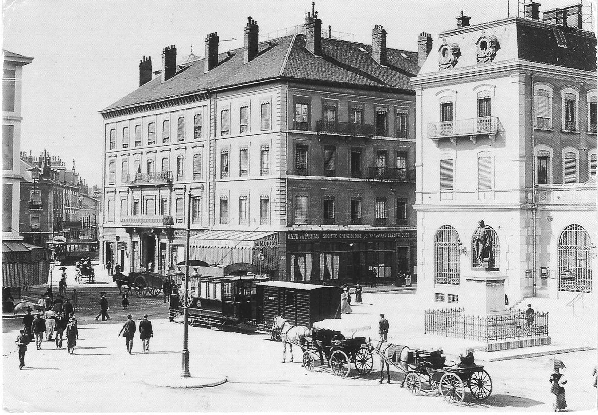 Place Vaucanson en 1897 à Grenoble : L'immeuble sur la droite est l'hôtel des postes et télégraphes achevé en 1888, avec devant la statue de Jacques de Vaucanson. Au centre, un immeuble d'habitation avec au rez-de-chaussée l'agence de la société grenobloise de tramways électriques. Le tramway visible est celui de l'une des deux lignes qui passaient par la place Vaucanson, Grenoble-Eybens et Grenoble-Voreppe.